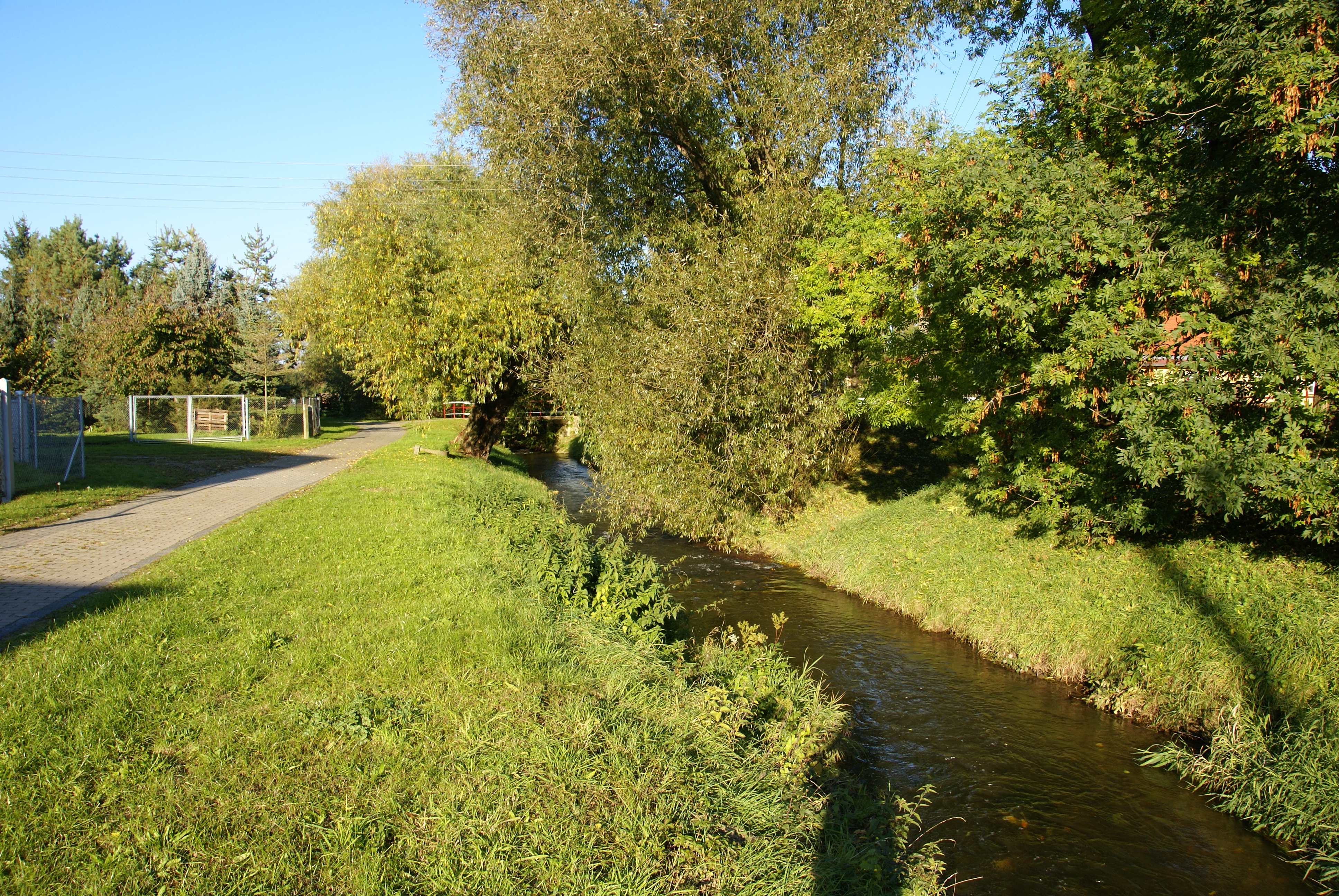 Die Eine in Welbsleben im Landkreis Mansfeld-Südharz